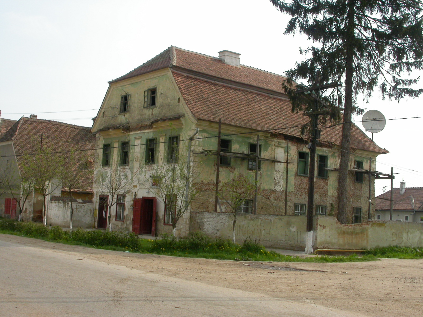 Casa familiei Brukenthal (Casa Samuel Brukenthal), sec. XVIII